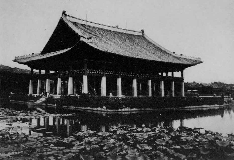 慶会楼 景福宮の中